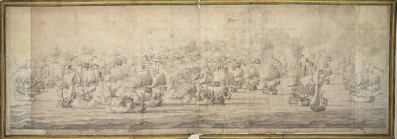 Vorstudie mit der Seeschlacht vor Lowestoft 1665 mit der Explosion der Eendracht